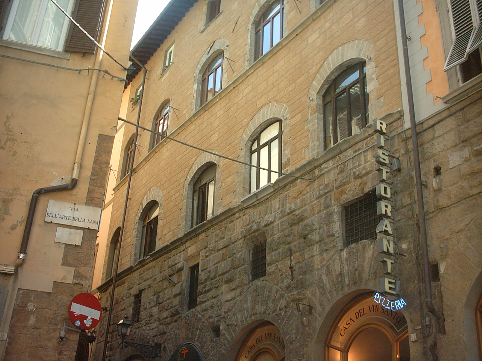 Palazzo dell'Arte di Calimala costruito alla fine del Trecento a Firenze